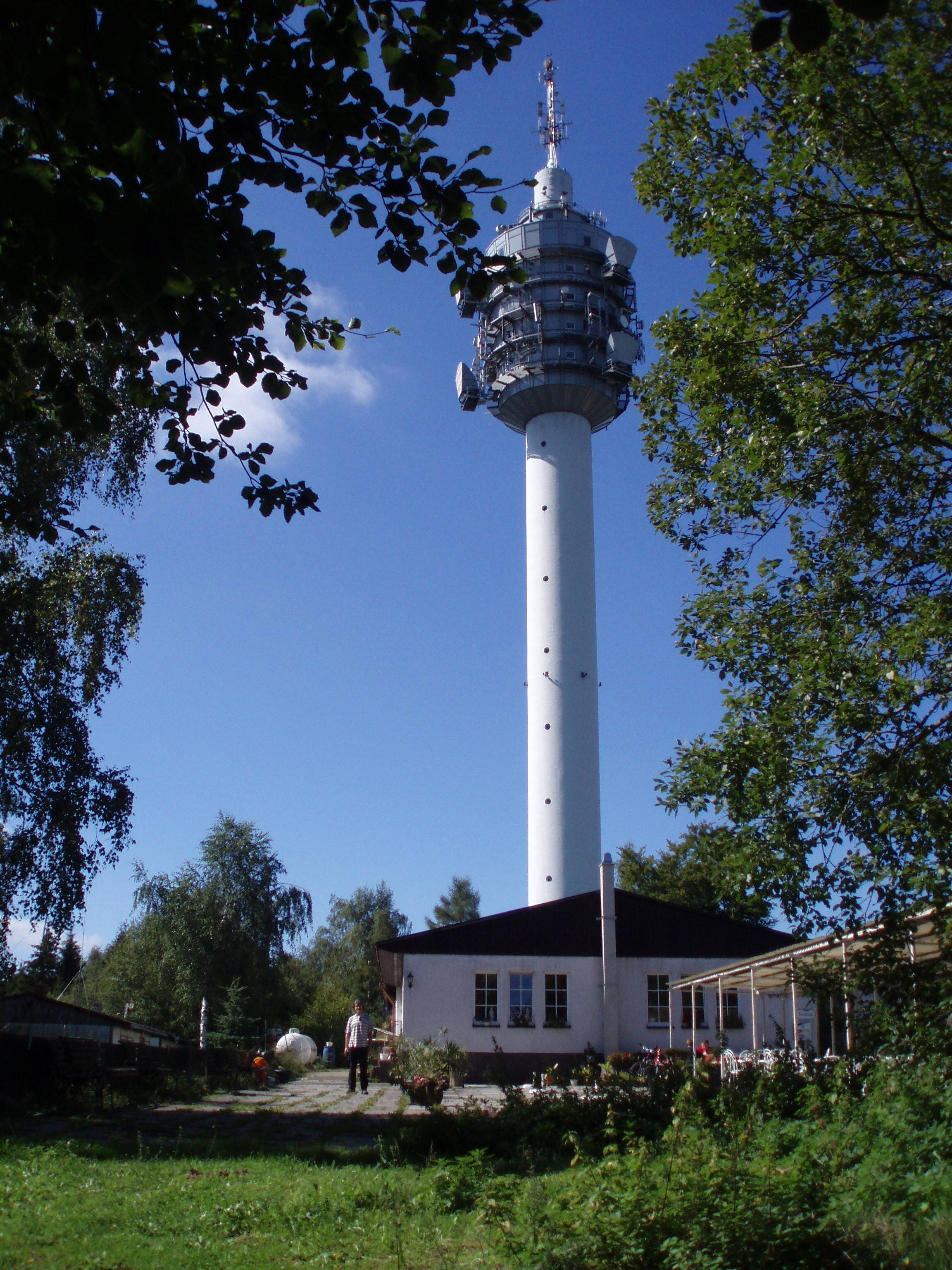 Fernsehturm auf dem Kulpenberg